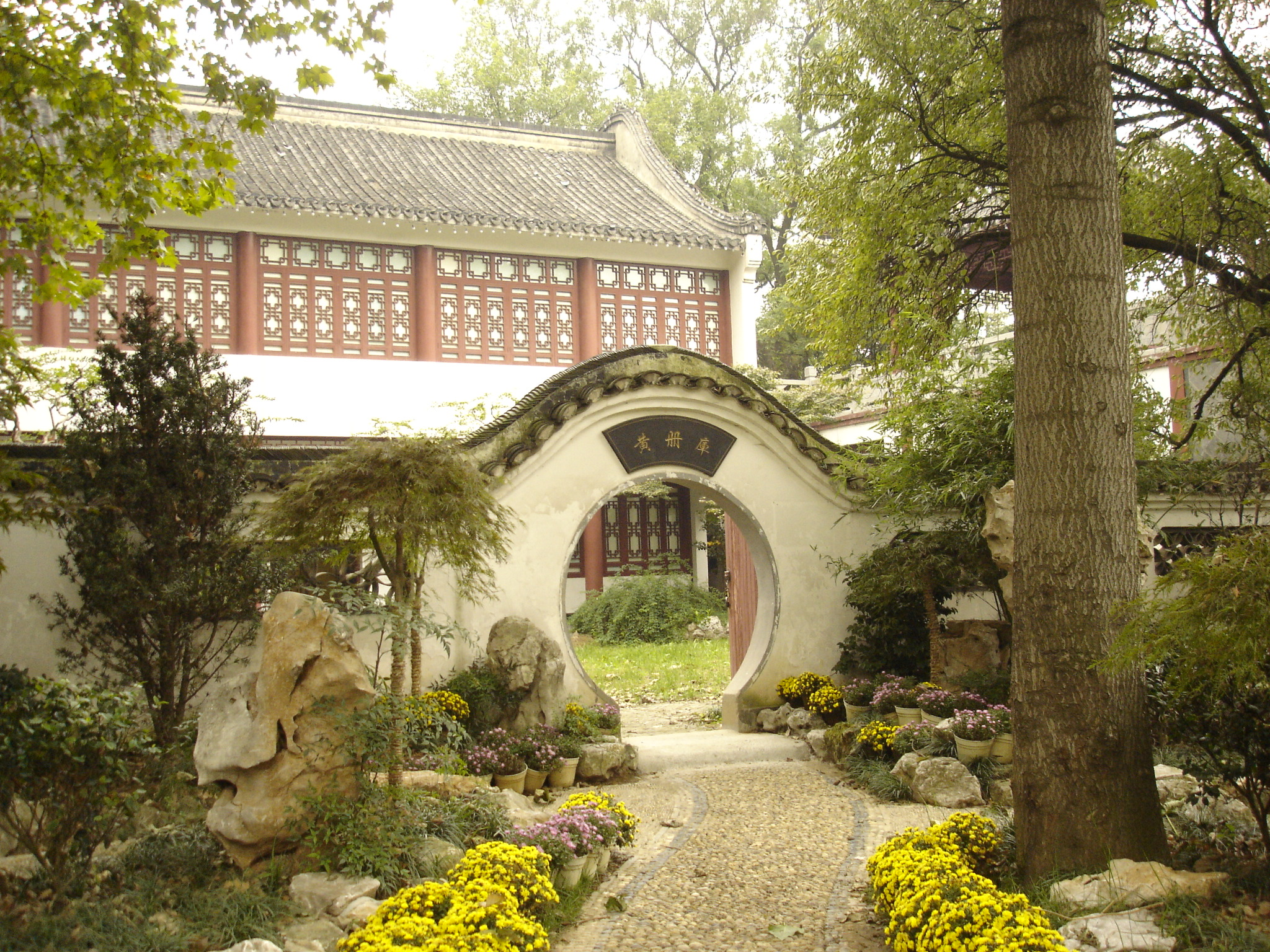 南京玄武湖，黄册库